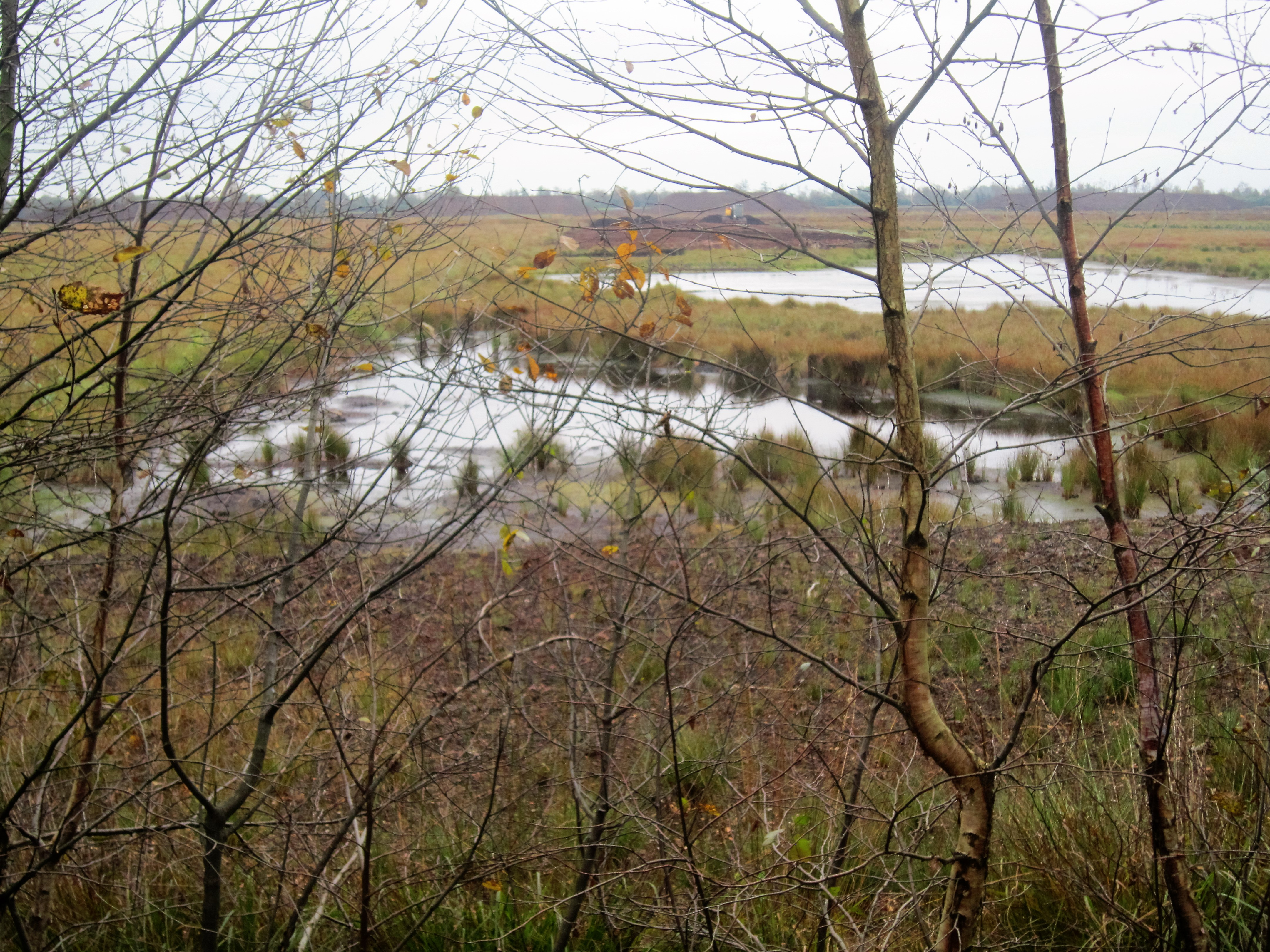 Wiedervernässte Fläche des Großen Moors am Moorlehrpfad Campemoor (Landkreis Vechta, Niedersachsen)